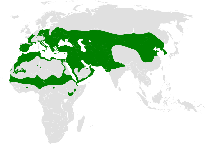 Galerida cristata distribution map, based on